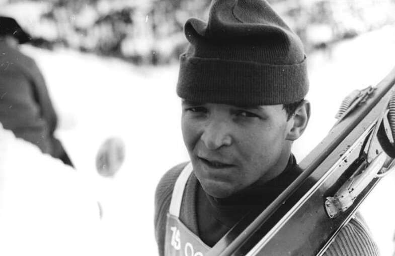 ADN-ZB Gahlbeck 9.1.72 Strbske Pleso: Sechsfacher DDR-Erfolg der Nordisch Kombinierten Mit 425,200 Punkten gewann Karl-Heinz Luck (SC Motor Zella-Mehlis) überlegen einen internationalen Wettbewerb in der nordischen Kombination in Strbske Pleso. Er verwies fünf weitere DDR-Sportler auf die nächsten Plätze. Erst danach konnten sich die Sportler aus der CSSR und der VR Polen plazieren. Grundlage des überlegenen Sieges von K.-H. Luck war seine hervorragende Laufleistung, bei der er seinen Konkurrenten fast vier Minuten abnahm.